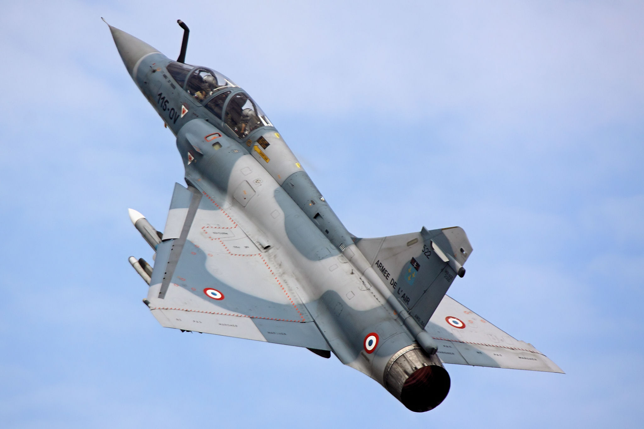 Mirage 2000 - RIAT 2010